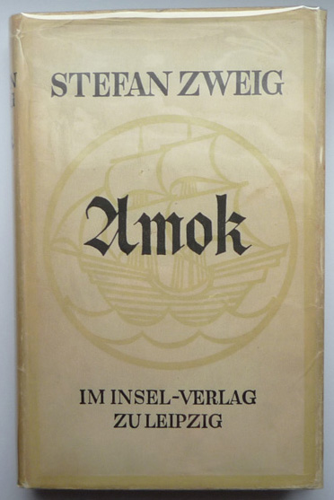 Amok, Originalausgabe, Insel, Leipzig 1922